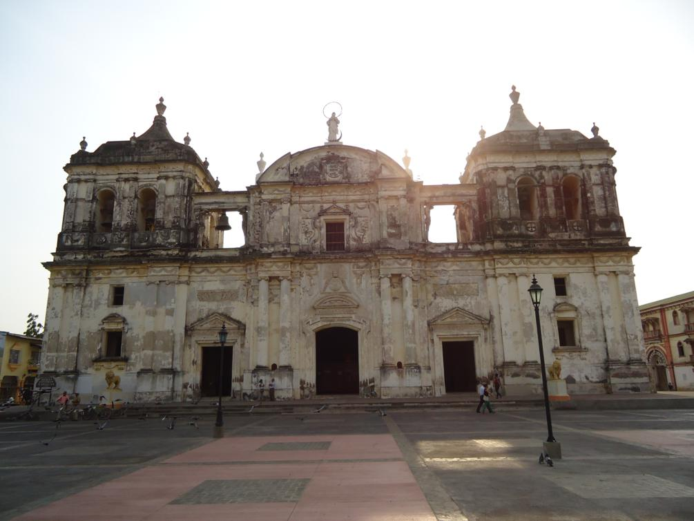 Catedral León, Nicaragua por Richard Weiss